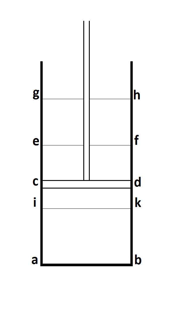 Schema che riproduce la struttura di una macchina termica descritta da Carnot nel suo trattato intitolato "Riflessioni sulla potenza motrice del fuoco" L'immagine è stata creata da me utilizzando paint.